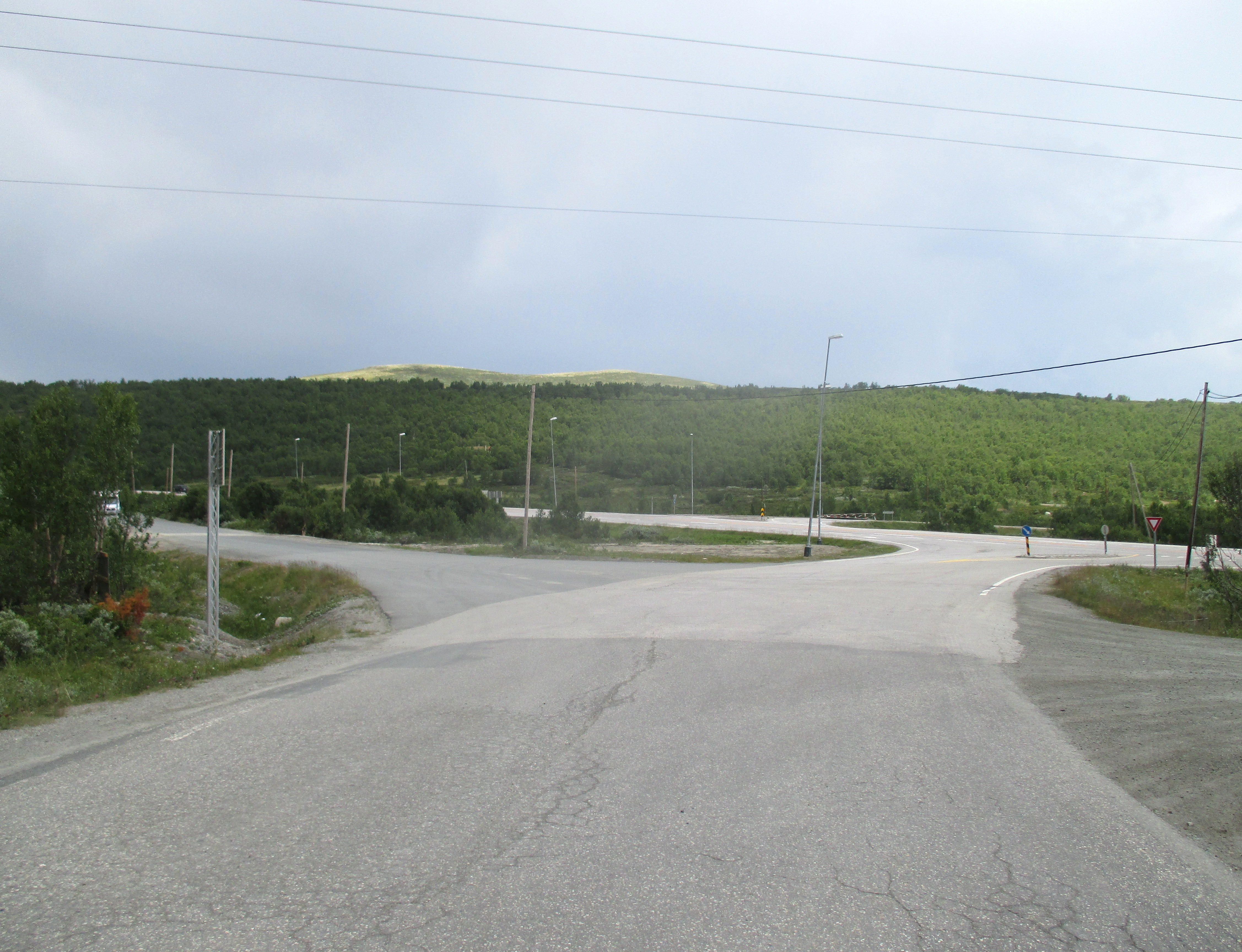 Fylkesvei 498 mot E6 på Hjerkinn